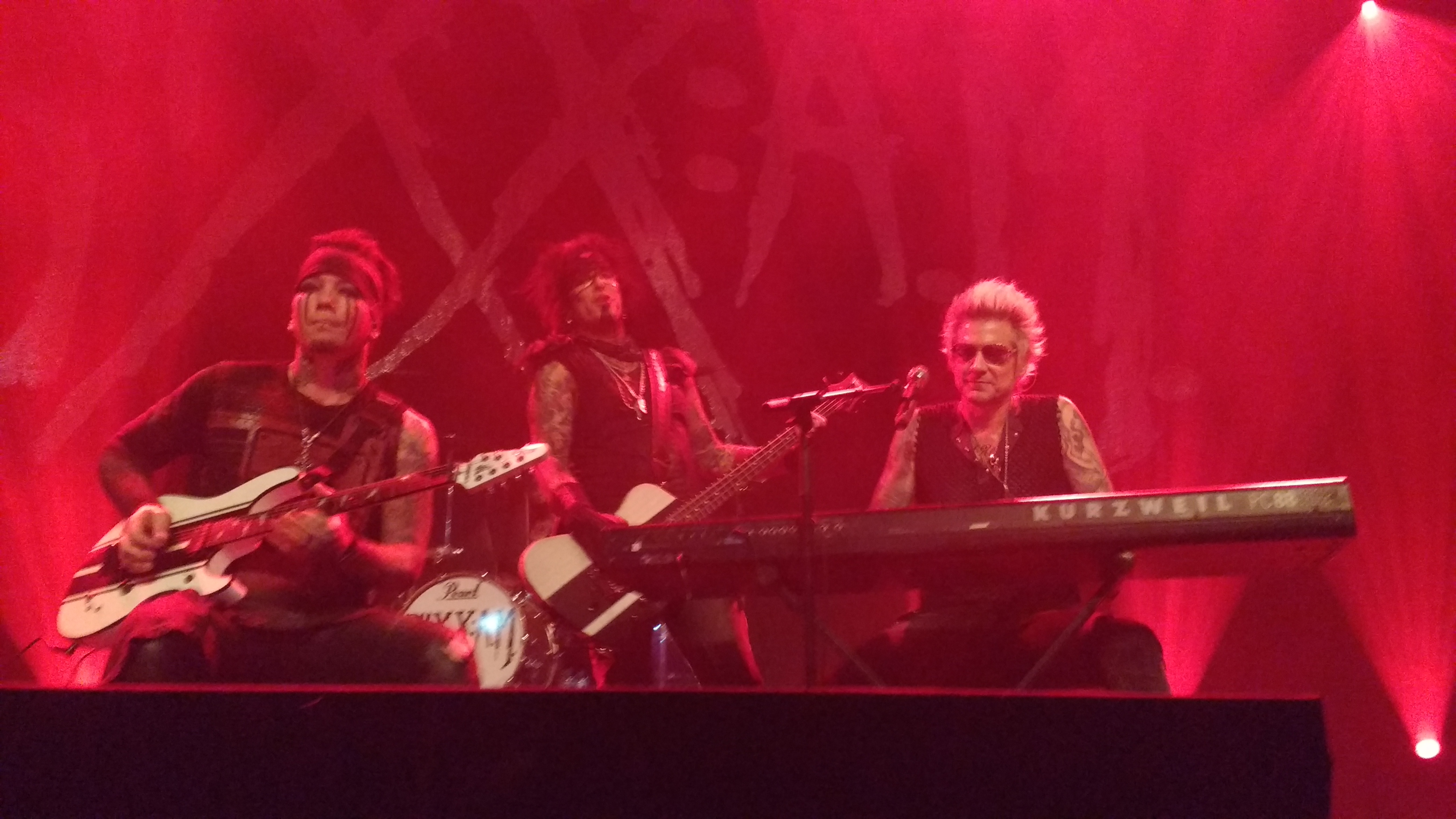 Sixx:A.M. tijdens hun eerste optreden in Nederland, in Utrecht